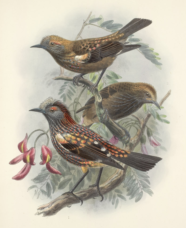 (Palmeria dolei), (Wils.) 1. Adult, 2. Juv. (First Plummage), 3. Med.